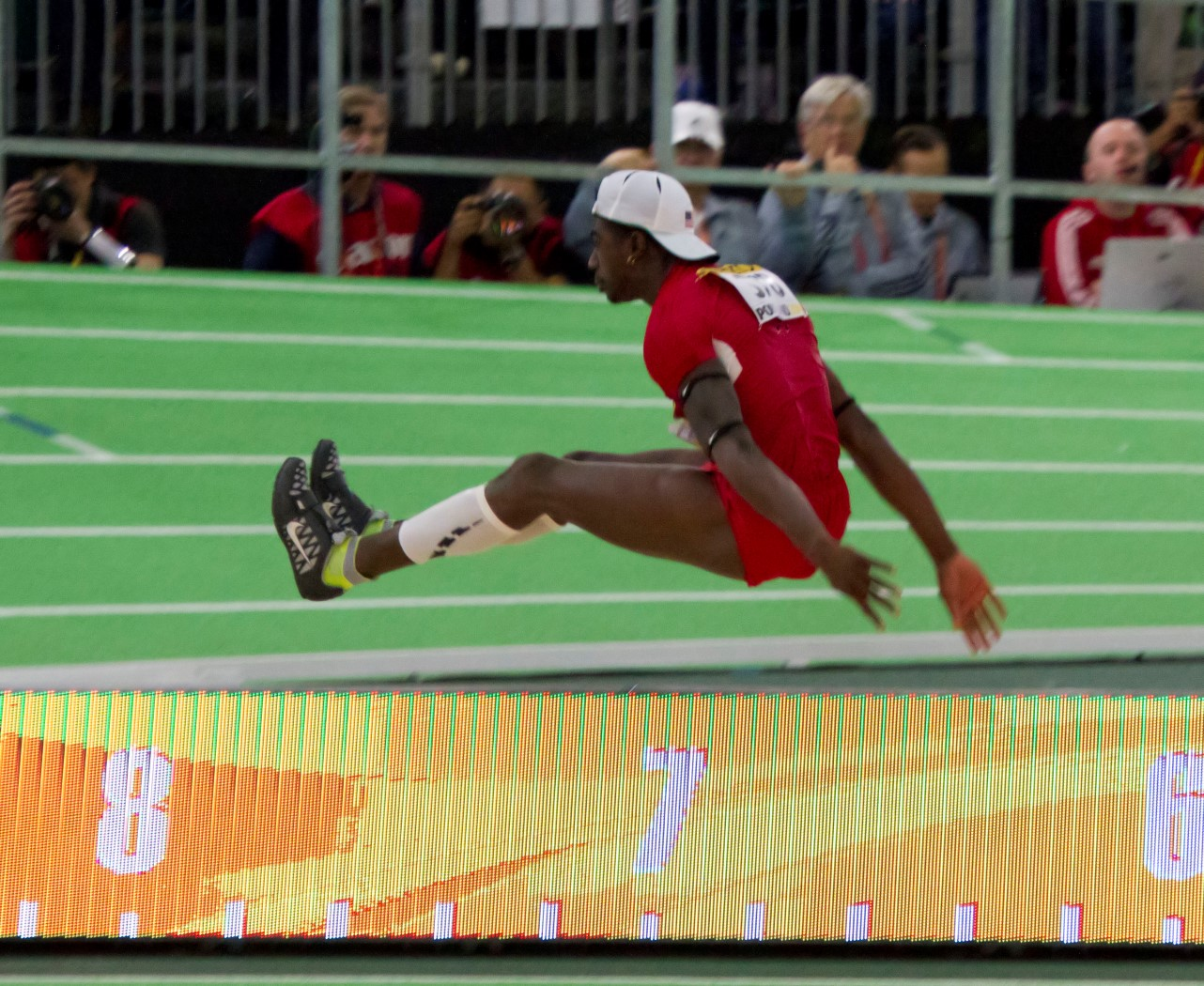 5190 dendy winnaar verspringen